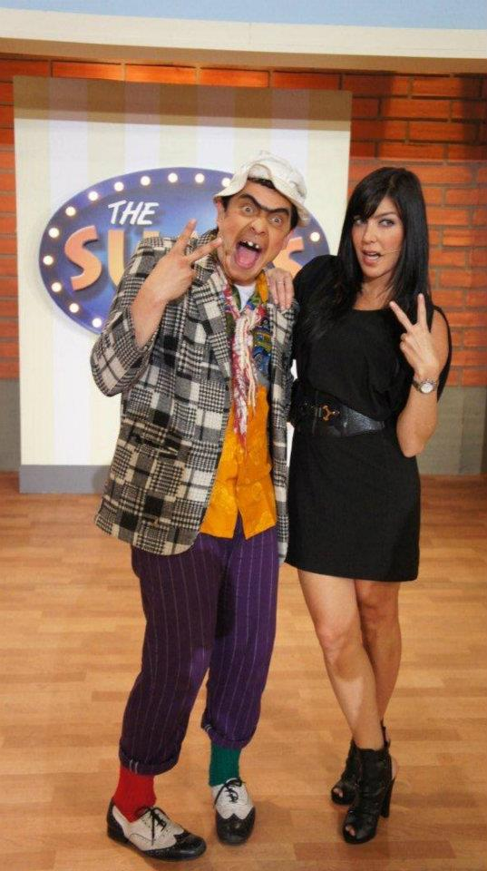 En esta fotografia, Suso el paspi e isabella santodomingo como invitada en el programa de televisión. (The Suso's Show)